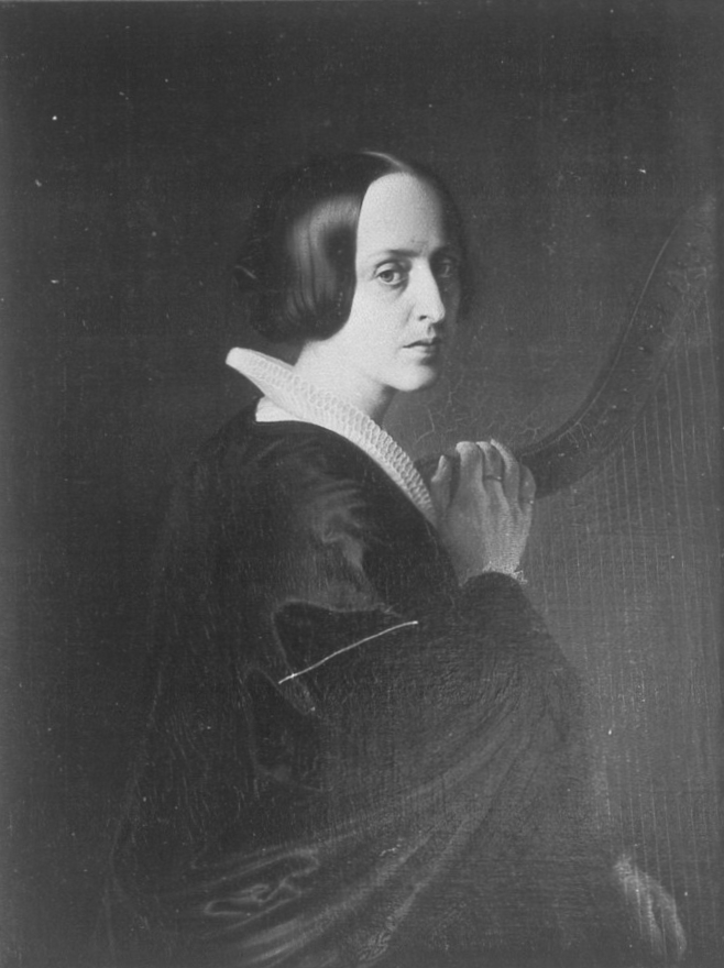 Amalie Zimmermann, geboren Geller. Die Frau des Malers mit Harfe, Niesky, private Sammlung. Deutsche Fotothek, Aufnahme-Nr. FD 50 5951823